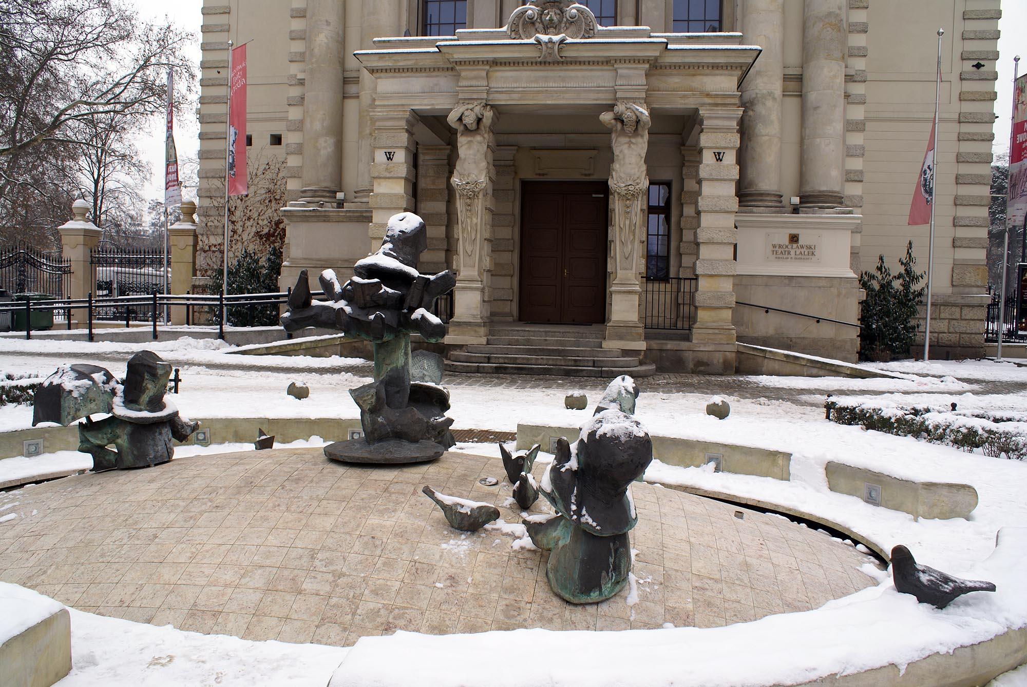 Wrocław, resursa kupiecka, 1892-1909